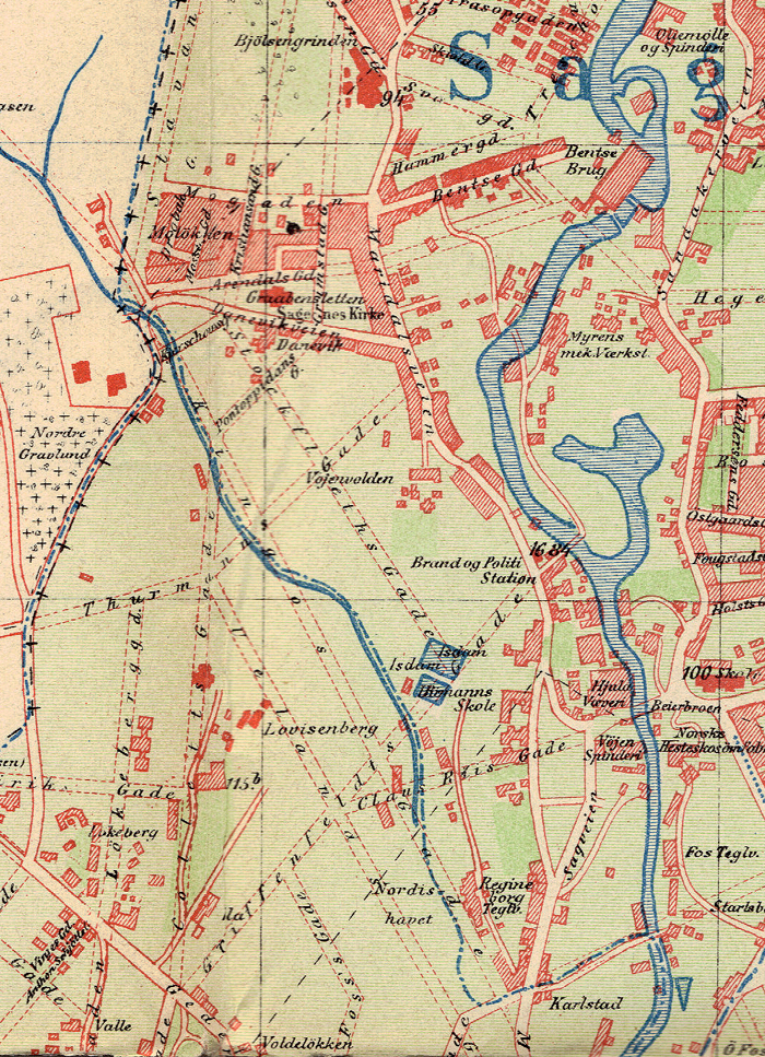 Sagene, Oslo.